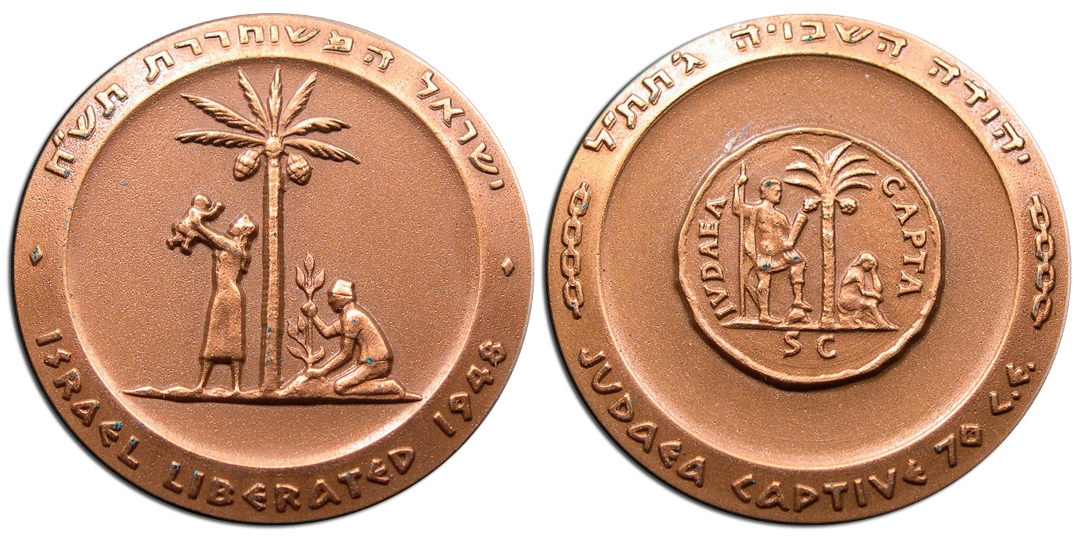 מדליית שחרור דור ג' ברונזה